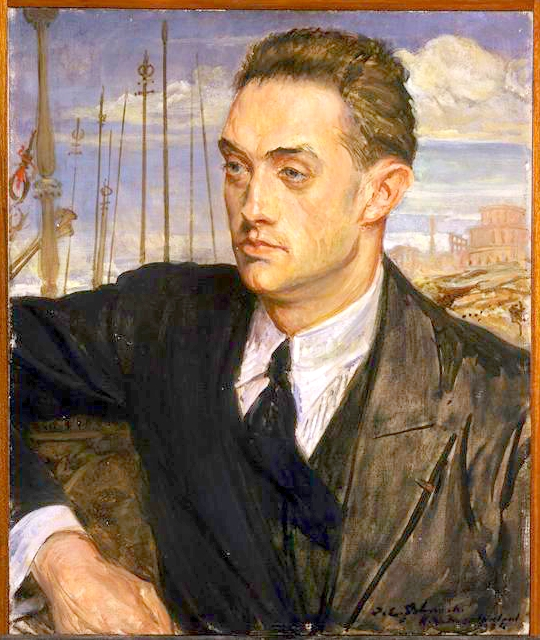 Portrait de Henry de Montherlant